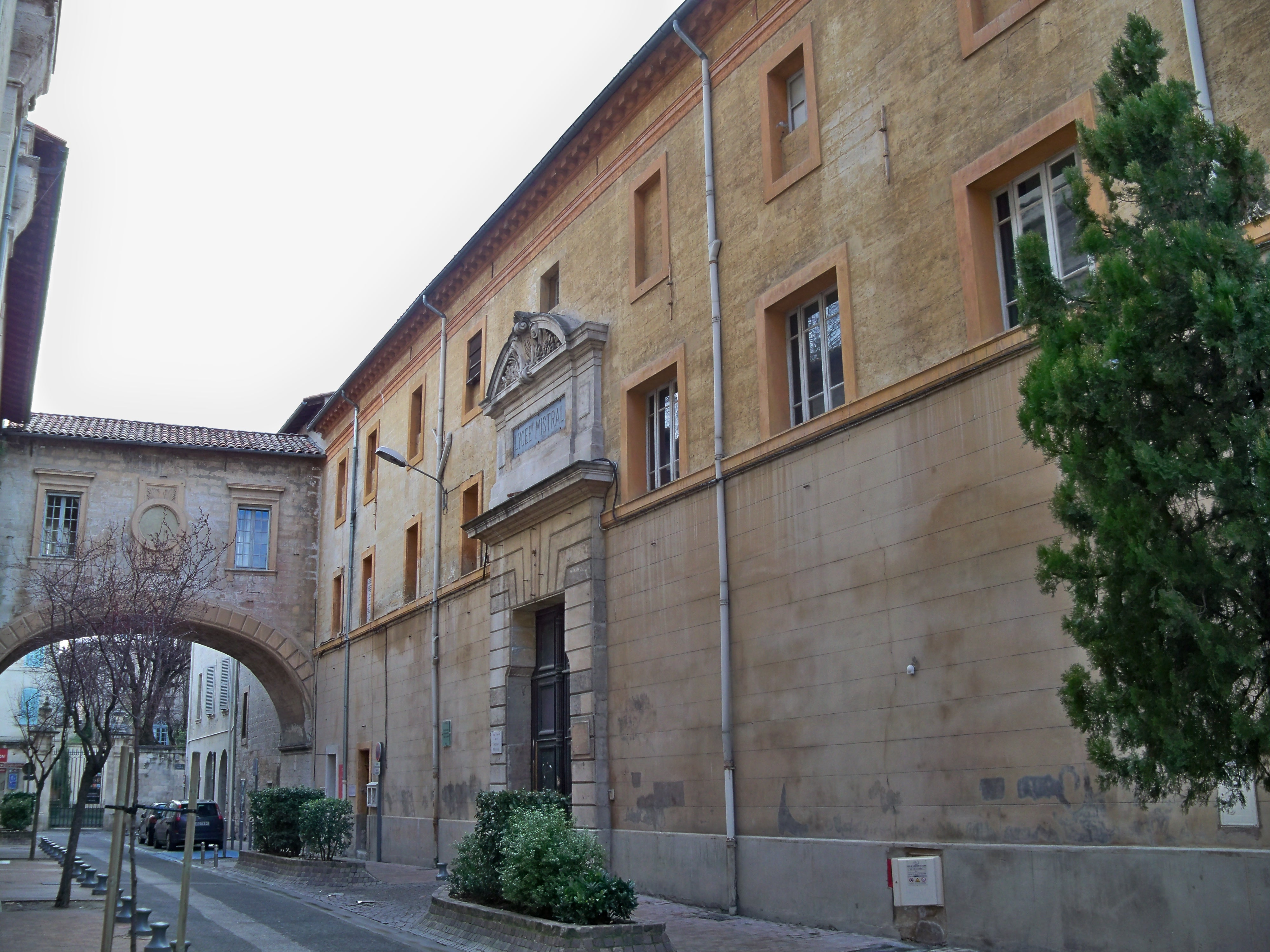 Petit Lycée Mistral d'Avignon (Vaucluse)